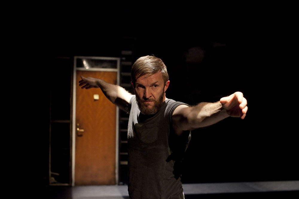 Timo Nieminen